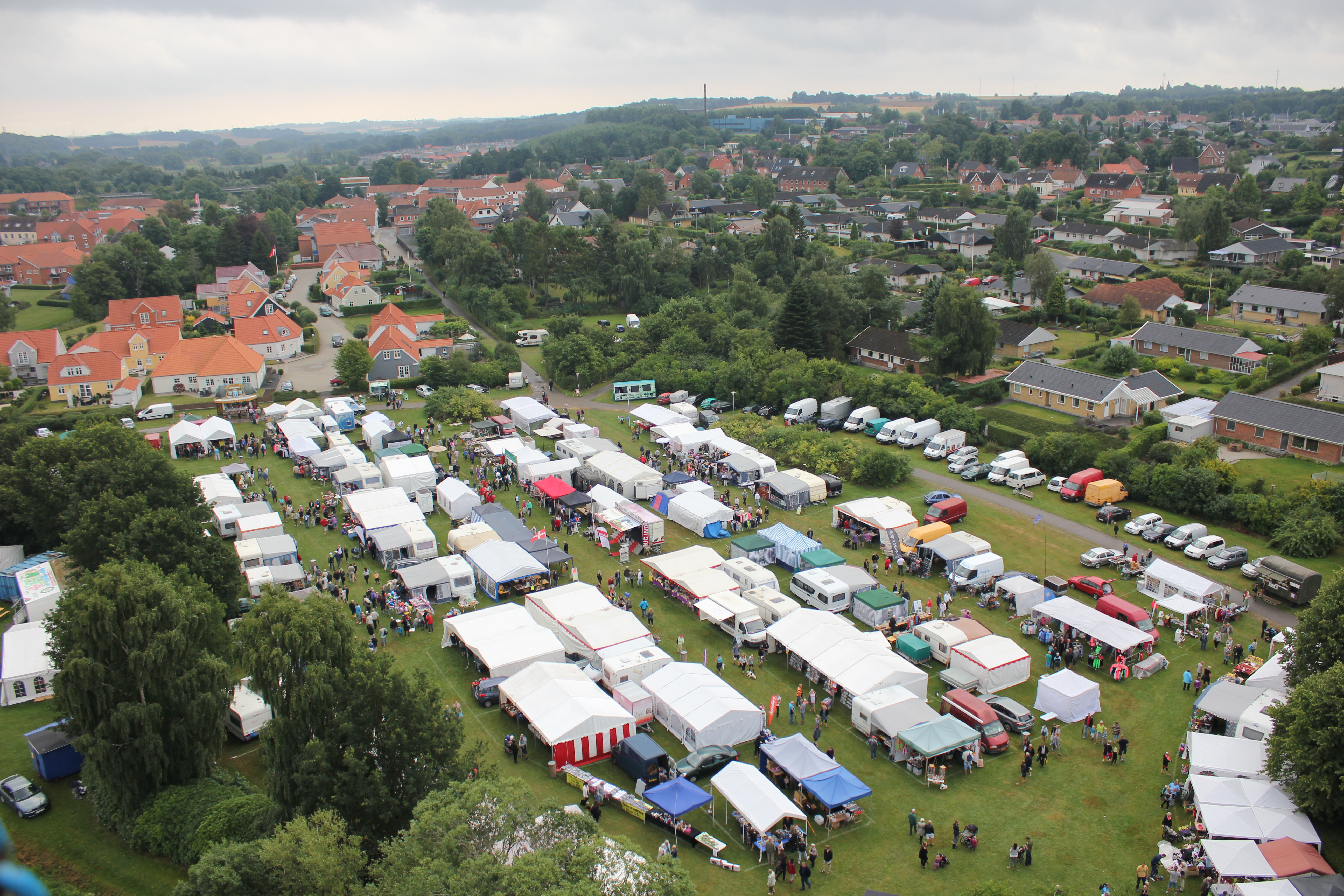 Lilleåmarked i Hadsten 2013. Set fra en kran.